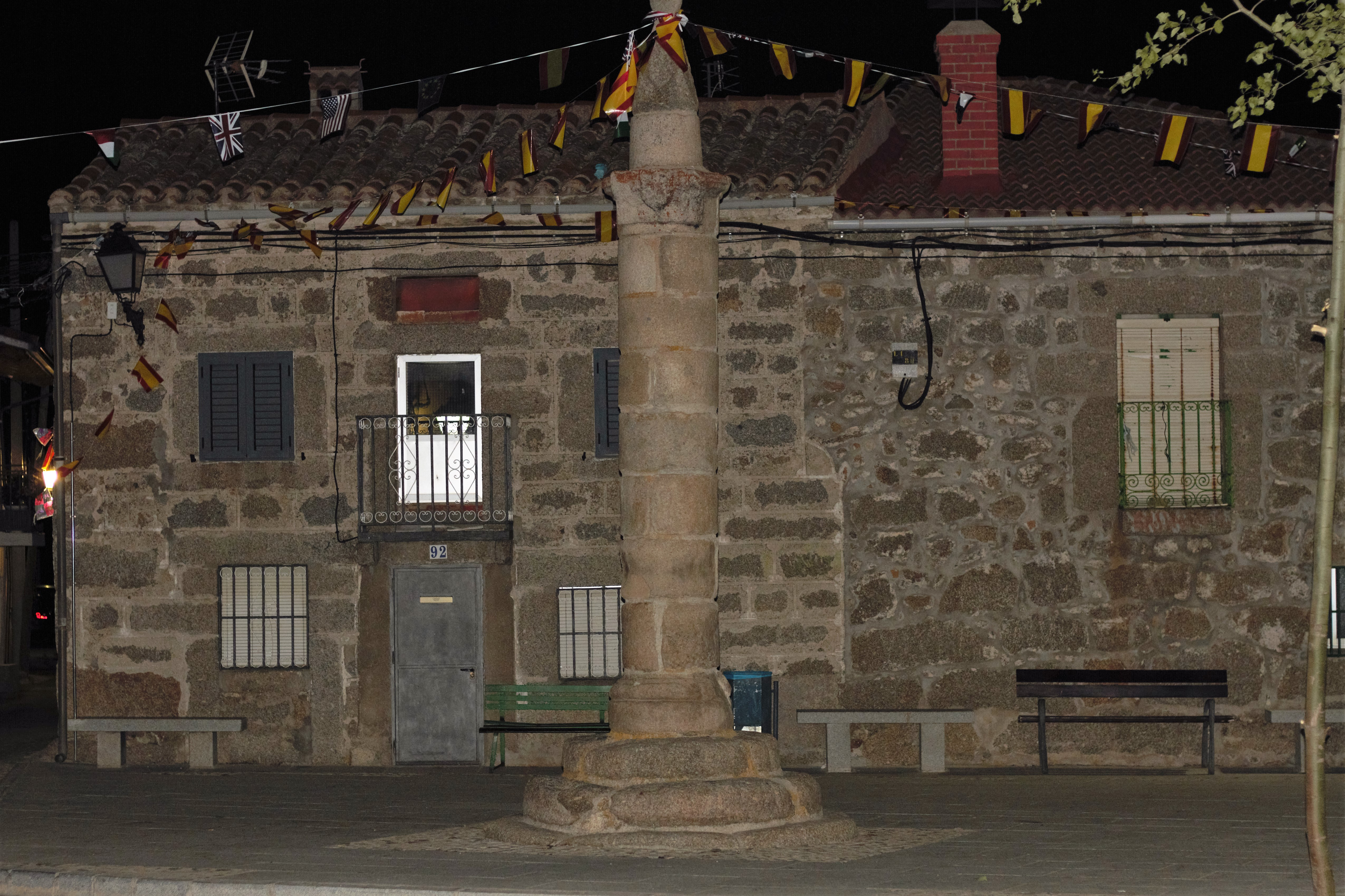 "El Rollo" plaza Muñotello